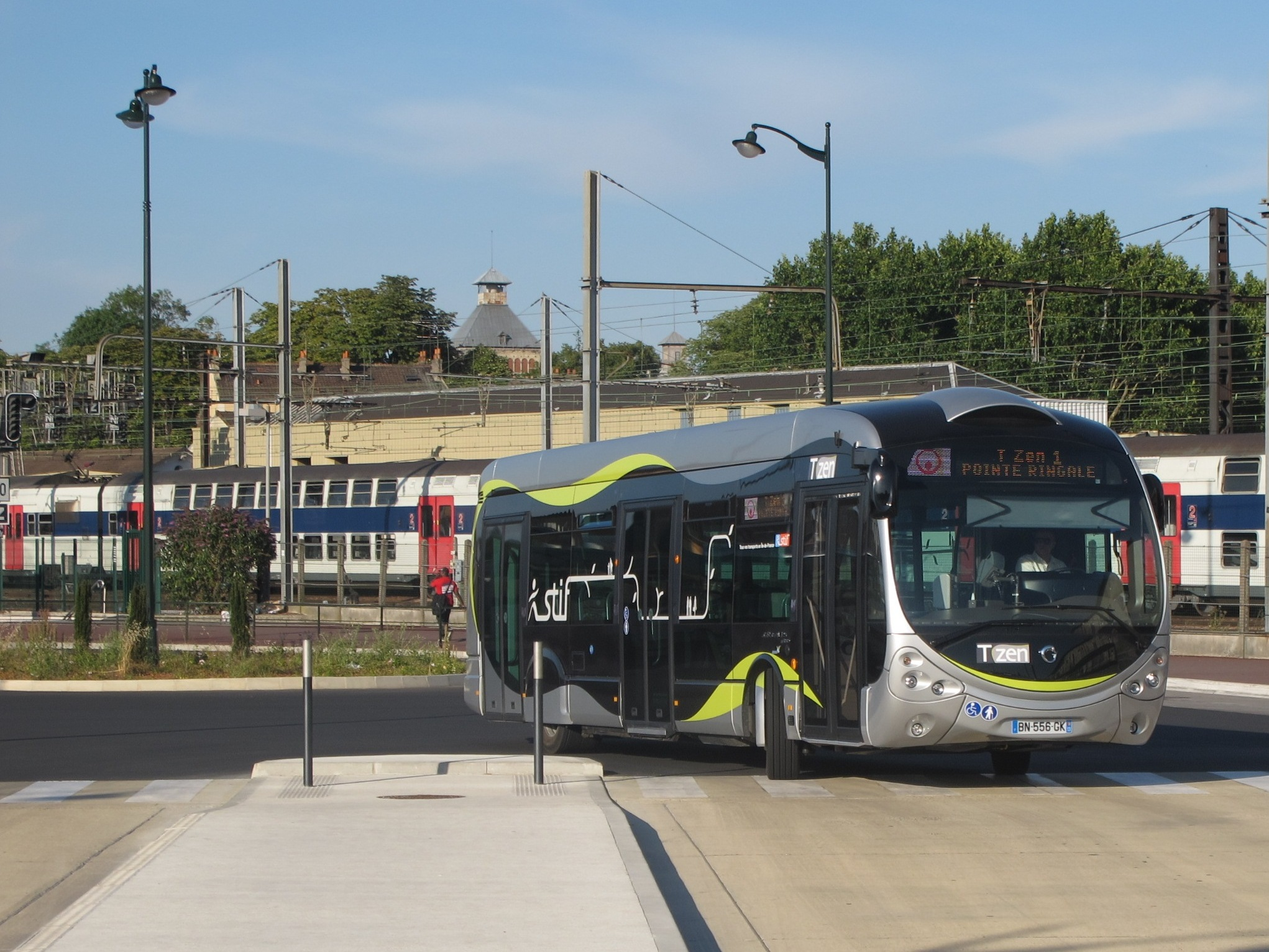 Bus T-ZEN ligne 1 - Gare de Lieusaint (Seine-et-Marne) - Gare de Corbeil-Essonnes (Essonne), France.